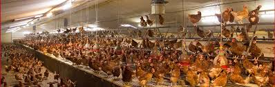 dit een een kippenstal. er zitten veel kippe in